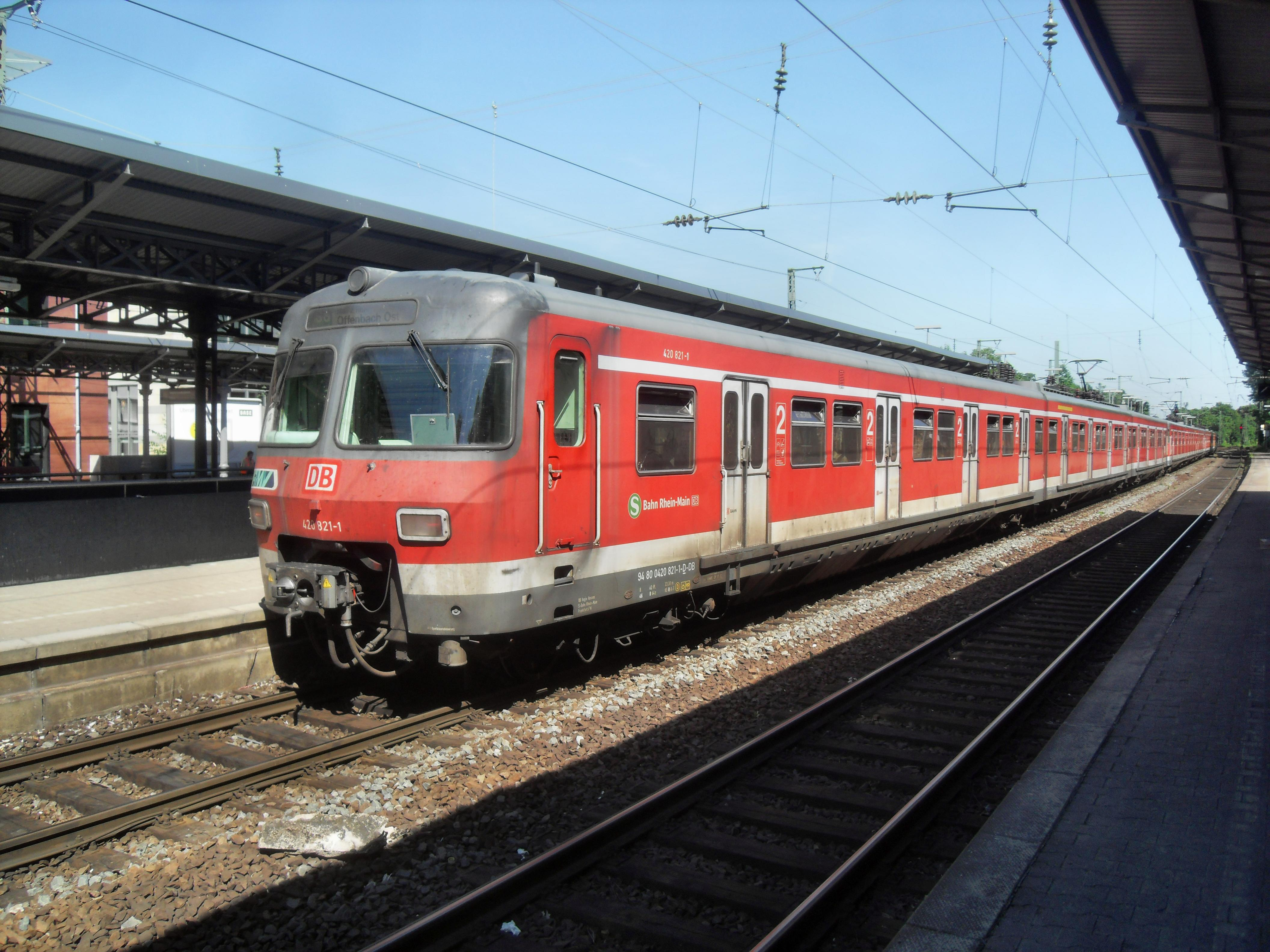 S8 der S-Bahn Rhein-Main im Bahnhof Mainz Römisches Theater auf dem Weg nach Offenbach